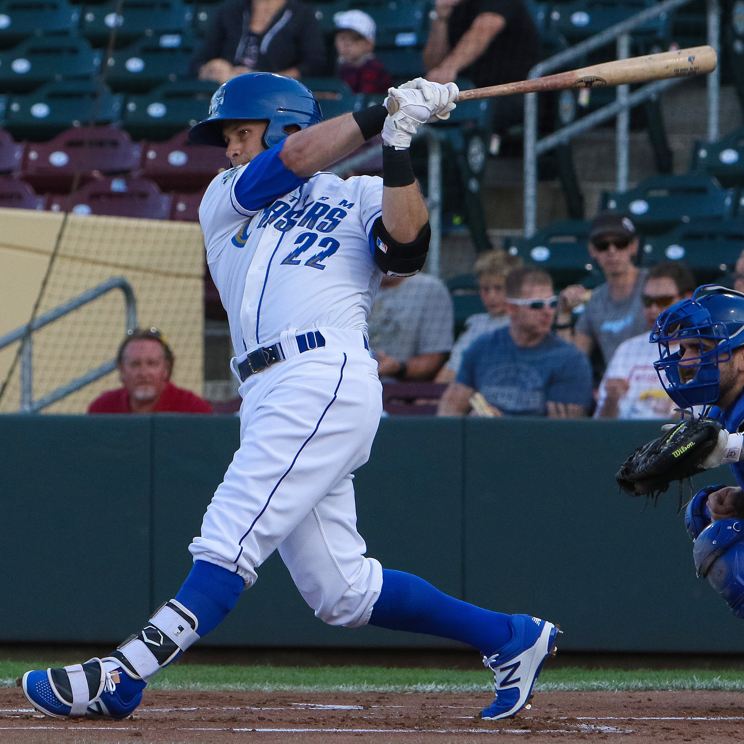 Daniel Nava